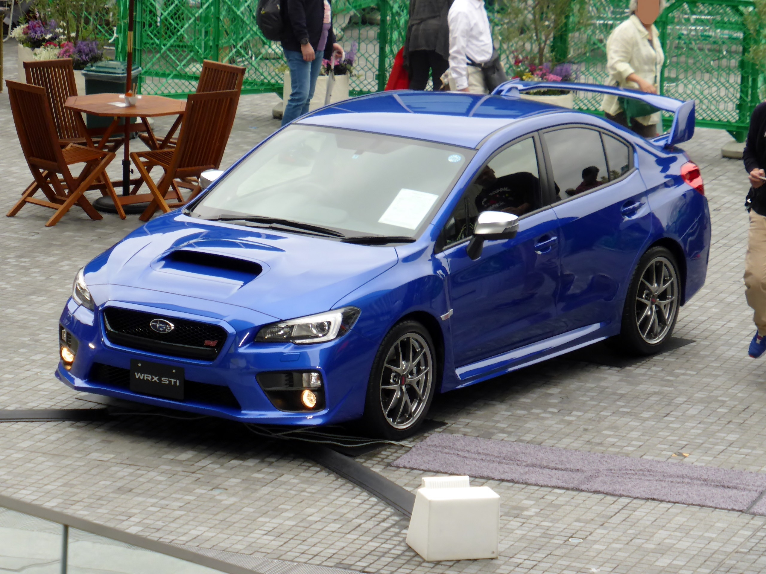 VAB型スバル・WRX STI タイプSをフロントから撮影。